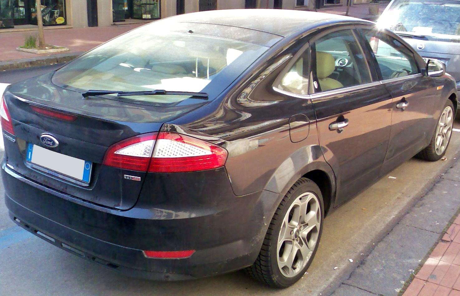 vista posteriore della Mondeo 5 porte